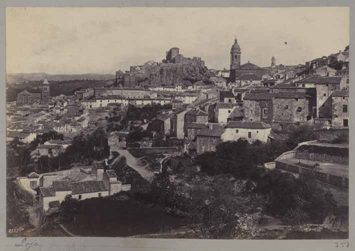 Loja.